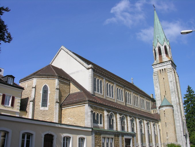 Eglise du Sacré-Coeur à La Chaux-de-Fonds (consacrée en 1927), néo-gothique